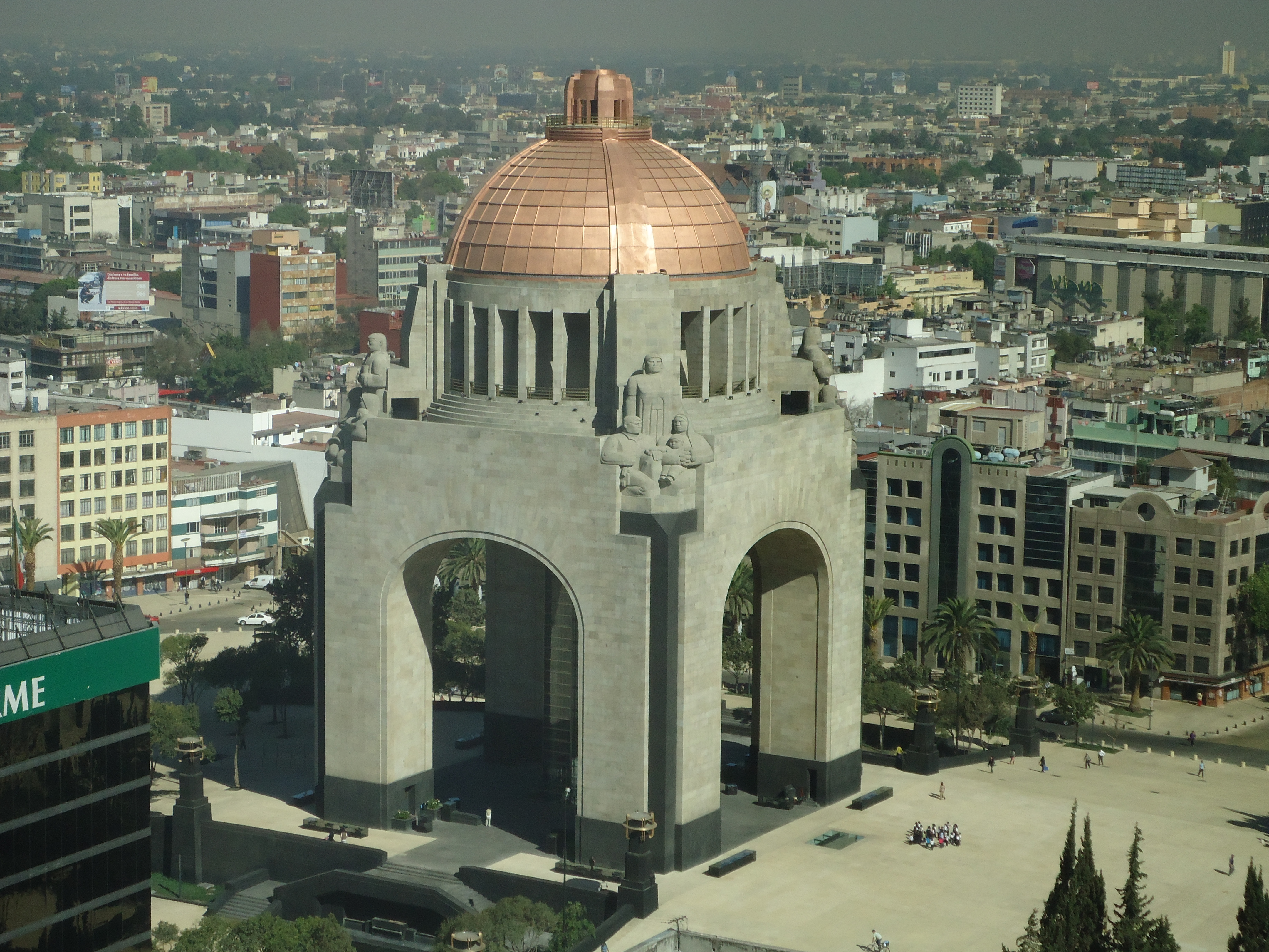 En conmemoración del CENTENARIO de la Revolución Mexicana el Gobierno del Distrito Federal realizó la rehabilitación y restauración de Plaza de la República, Monumento a la Revolución y Museo Nacional de la Revolución.